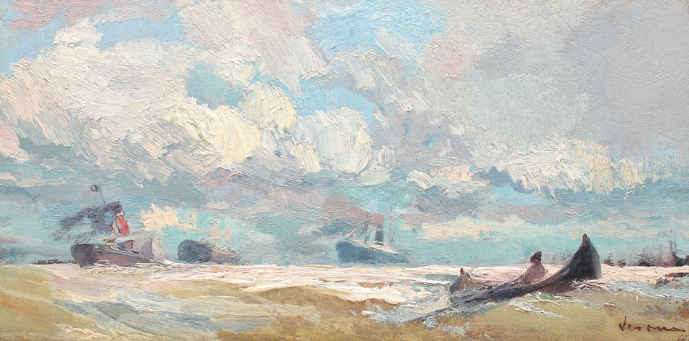 Plecarea la pescuit